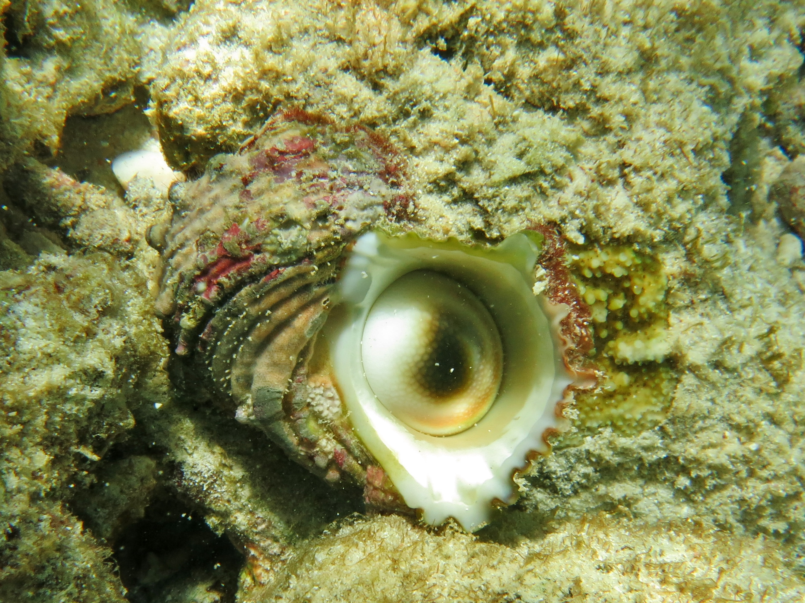 Un turban à bouche d'argent (Turbo argyrostomus) aux Maldives (Landaagiraavaru, atoll de Baa).